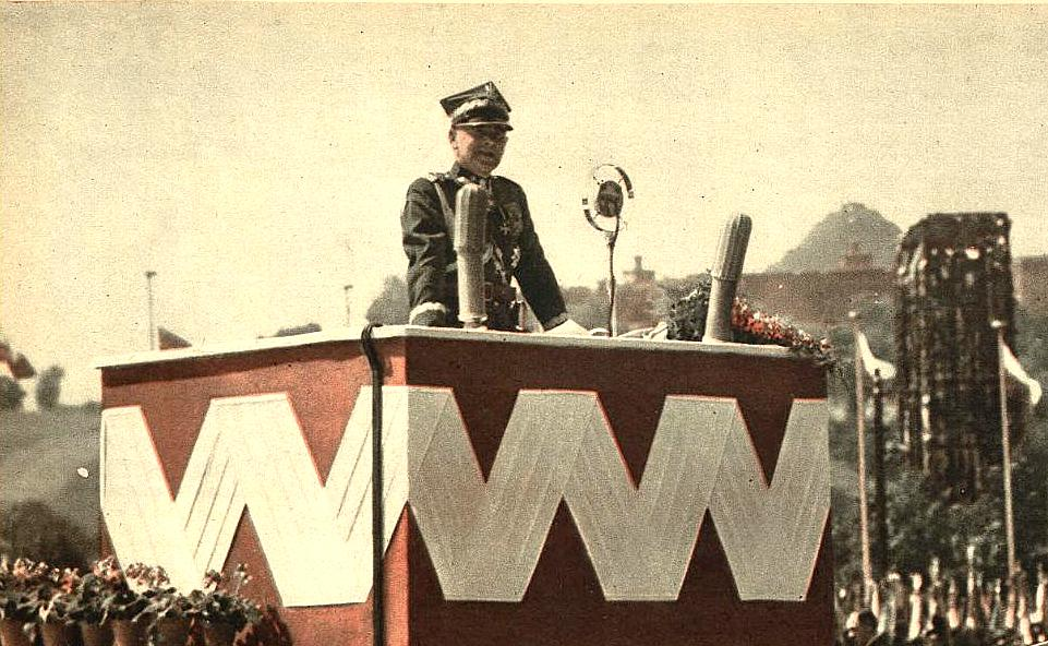 Edward Śmigły-Rydz podczas uroczystości 6 sierpnia 1939 w Krakowie